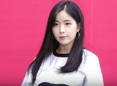 가수 겸 배우 조현영이 24일 오후 서울 중구 동대문디자인플라자(DDP)에서 열린 '2019F/W 서울패션위크' 바이브레이트(VIBRATE) 컬렉션에 참석했다. ·